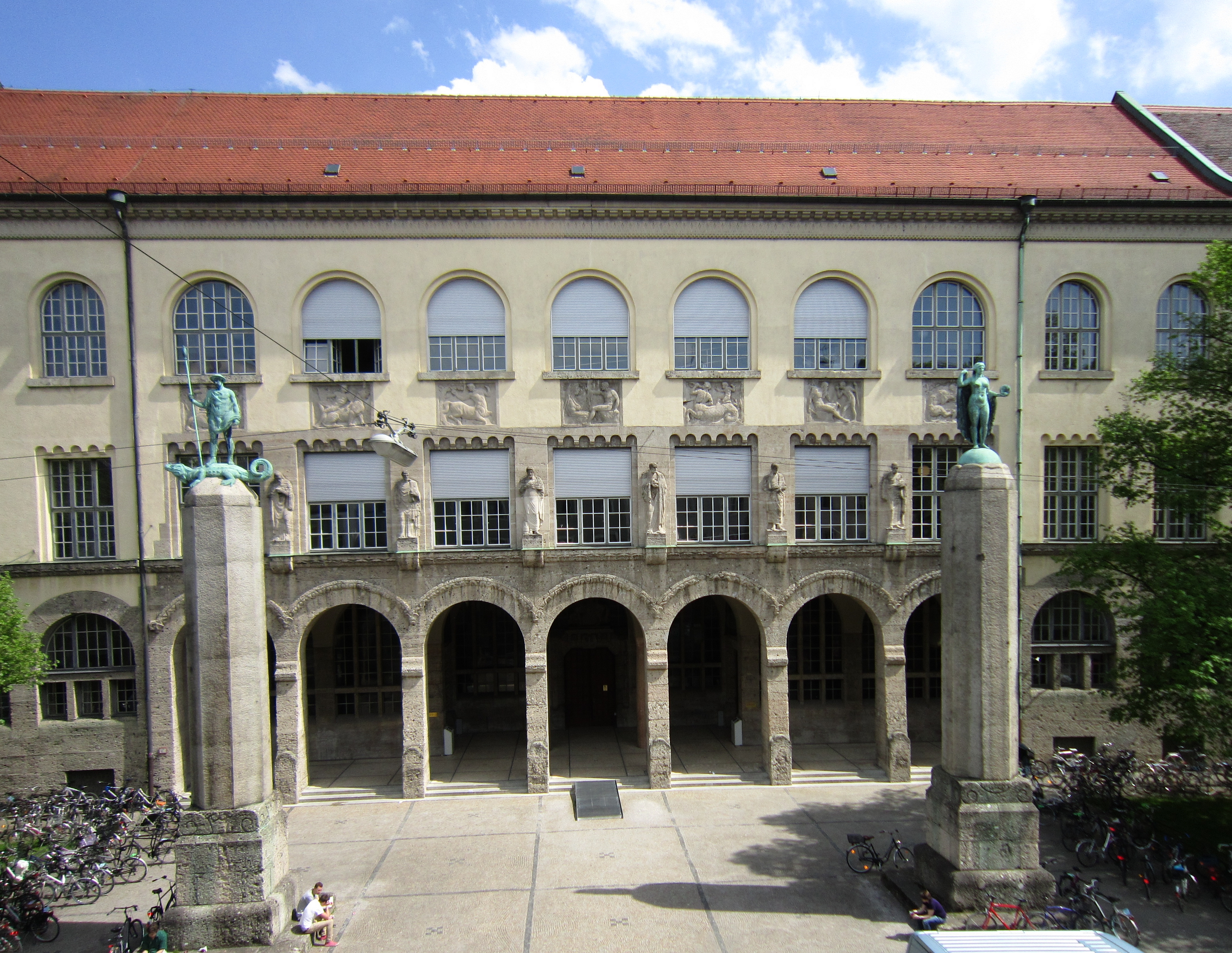 Eingang zur Ludwig-Maximilians-Universität München Amalienstraße Architekt German Bestelmeyer 1906 mit folgenden Kunstwerken: zwei allegorische Erzfiguren Sieg der Wissenschaft (links) und Wahrheit (rechts), von Hermann Hahn, 1907/10, gegossen von Wilhelm Rupp, auf 14 m hohen Pfeilern sechs Hochrelieffiguren von Josef Floßmann – Augustinus, Papinian, Solon, Hippokrates, Aristoteles und Archimedes – an der Fassade und darüber sieben antikisierende Reliefs mit Allegorien der Jugendideale von Georg Albershofer